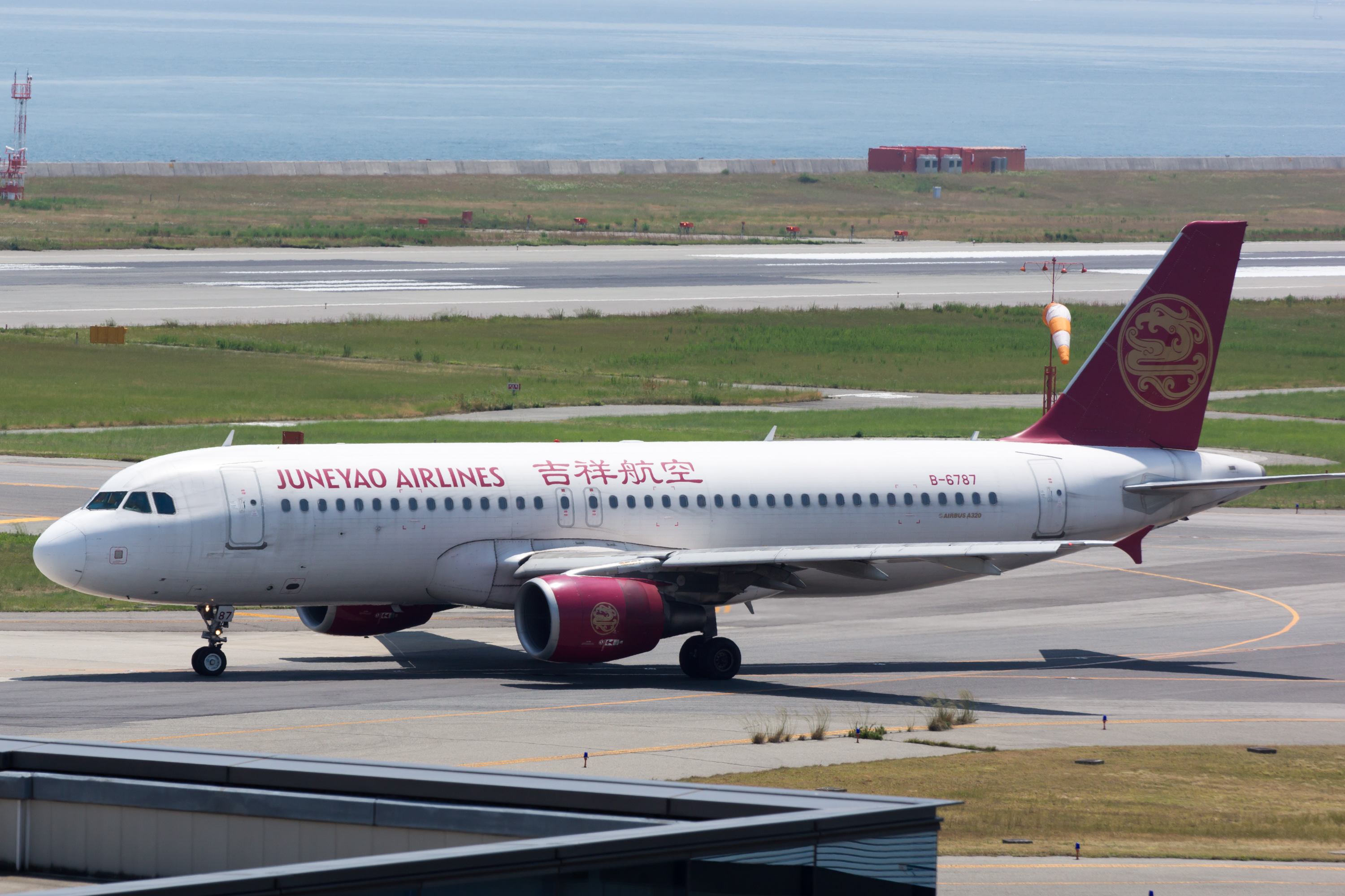 Juneyao Airlines / 吉祥航空 Airbus A320-214 B-6787 HO1336, Departed to Shanghai Osaka Kansai Int'l Airport